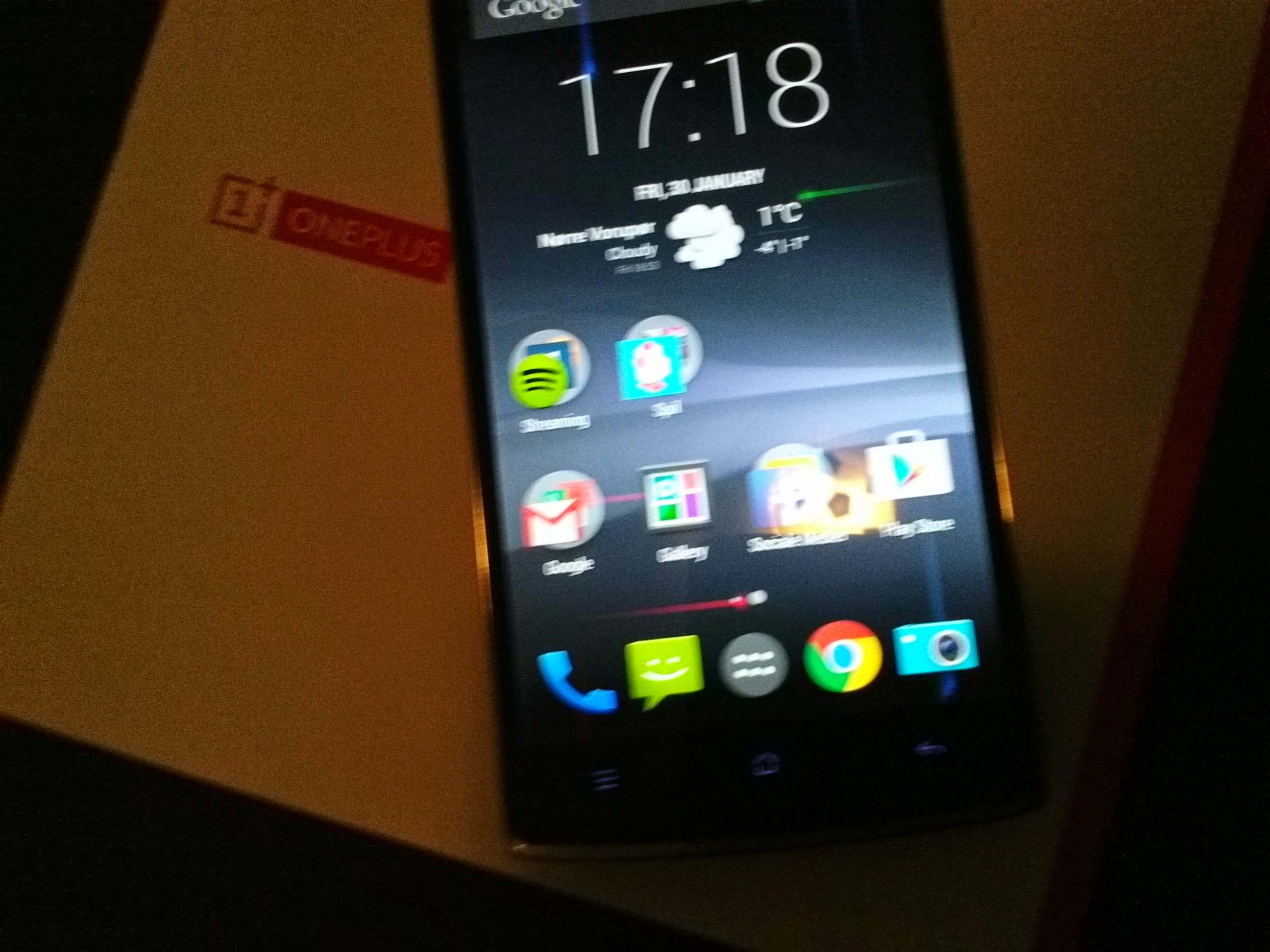 Dette er et billede af oneplus one mens den er tændt